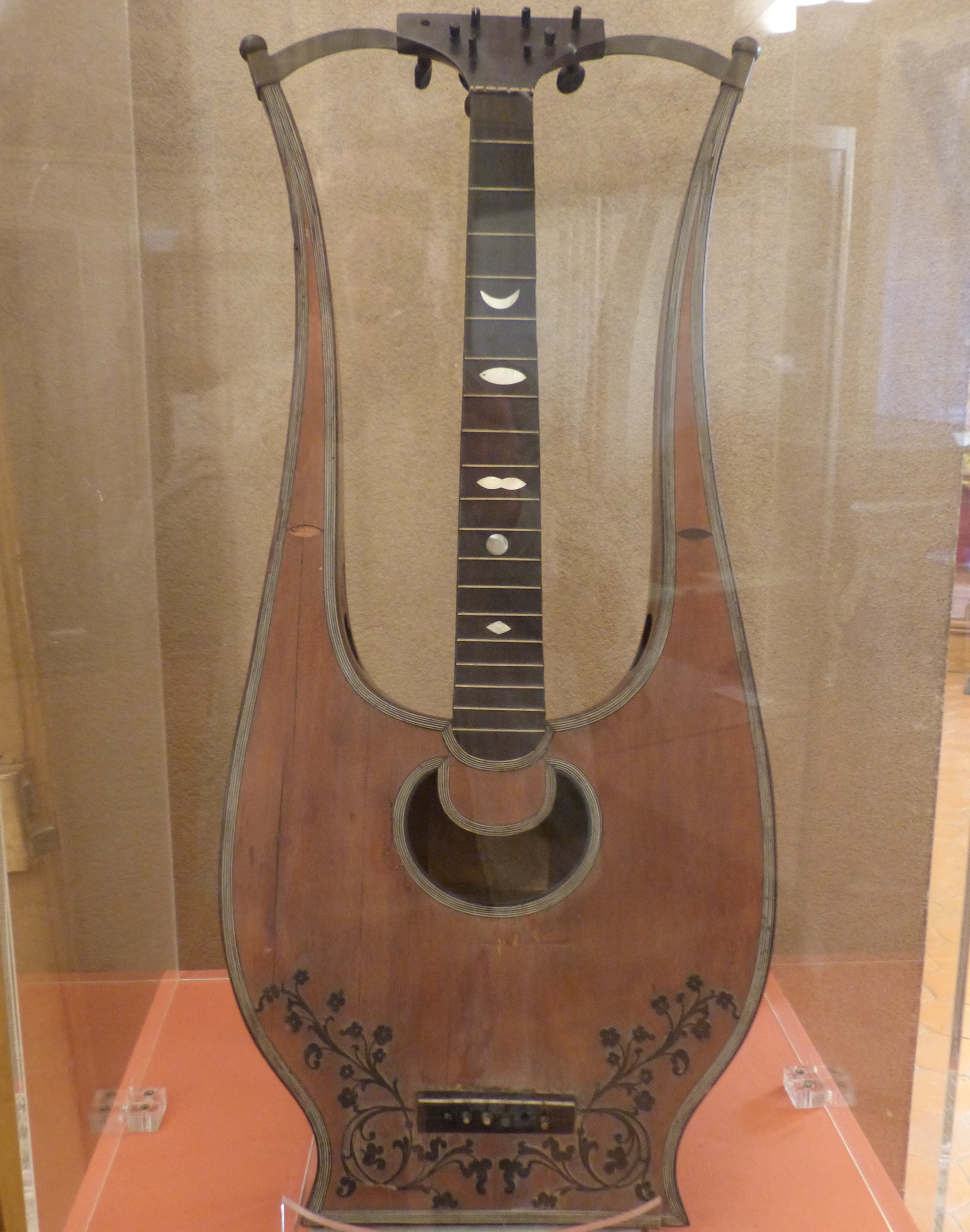 Nice (Alpes-Maritimes, France), au cœur du Vieux Nice, le palais Lascaris avec, entre autres, sa fabuleuse collection d'instruments de musique anciens, la deuxième de France.